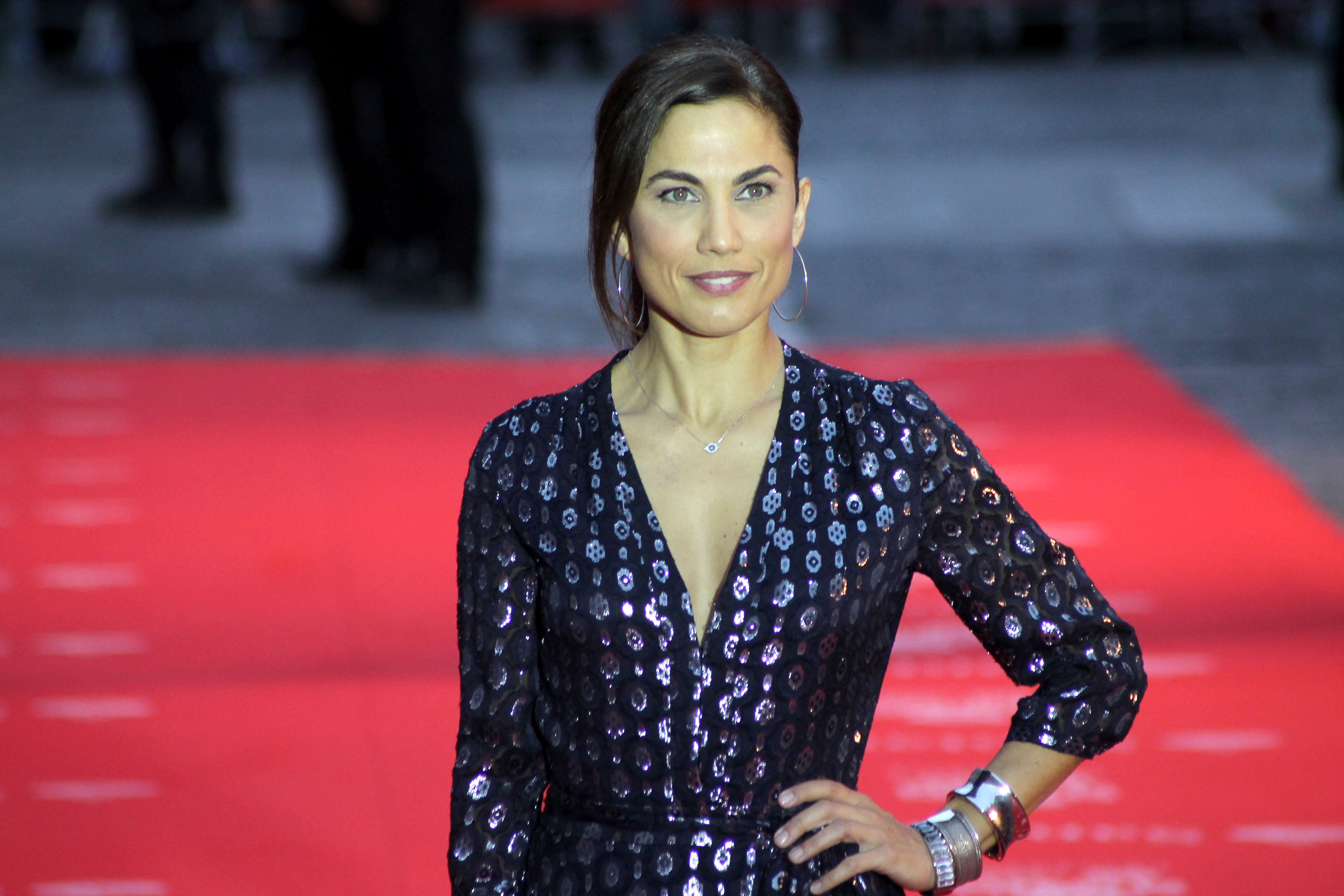 Seminci 2015